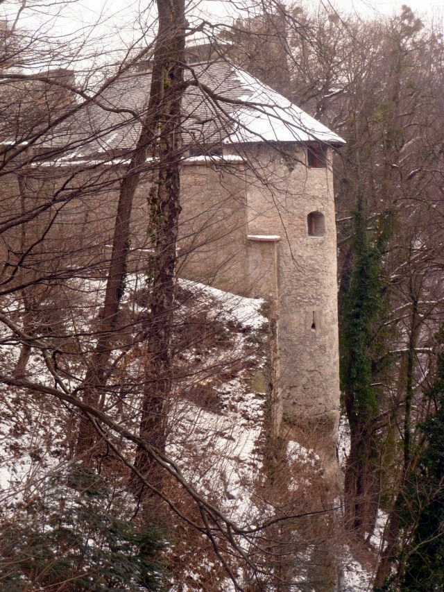 Barbaraturm, ehem. Pulverturm